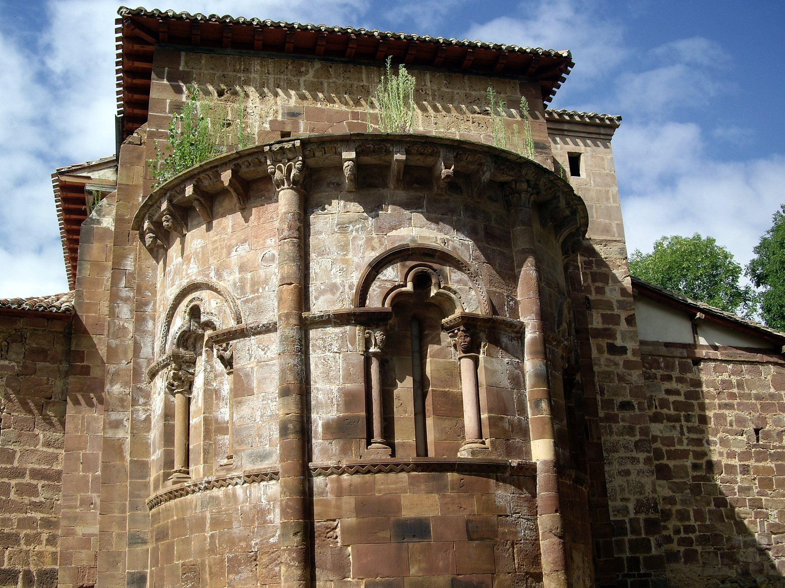 Iglesia parroquial de Nuestra Señora de Tresfuentes en Valgañón, La Rioja, España.